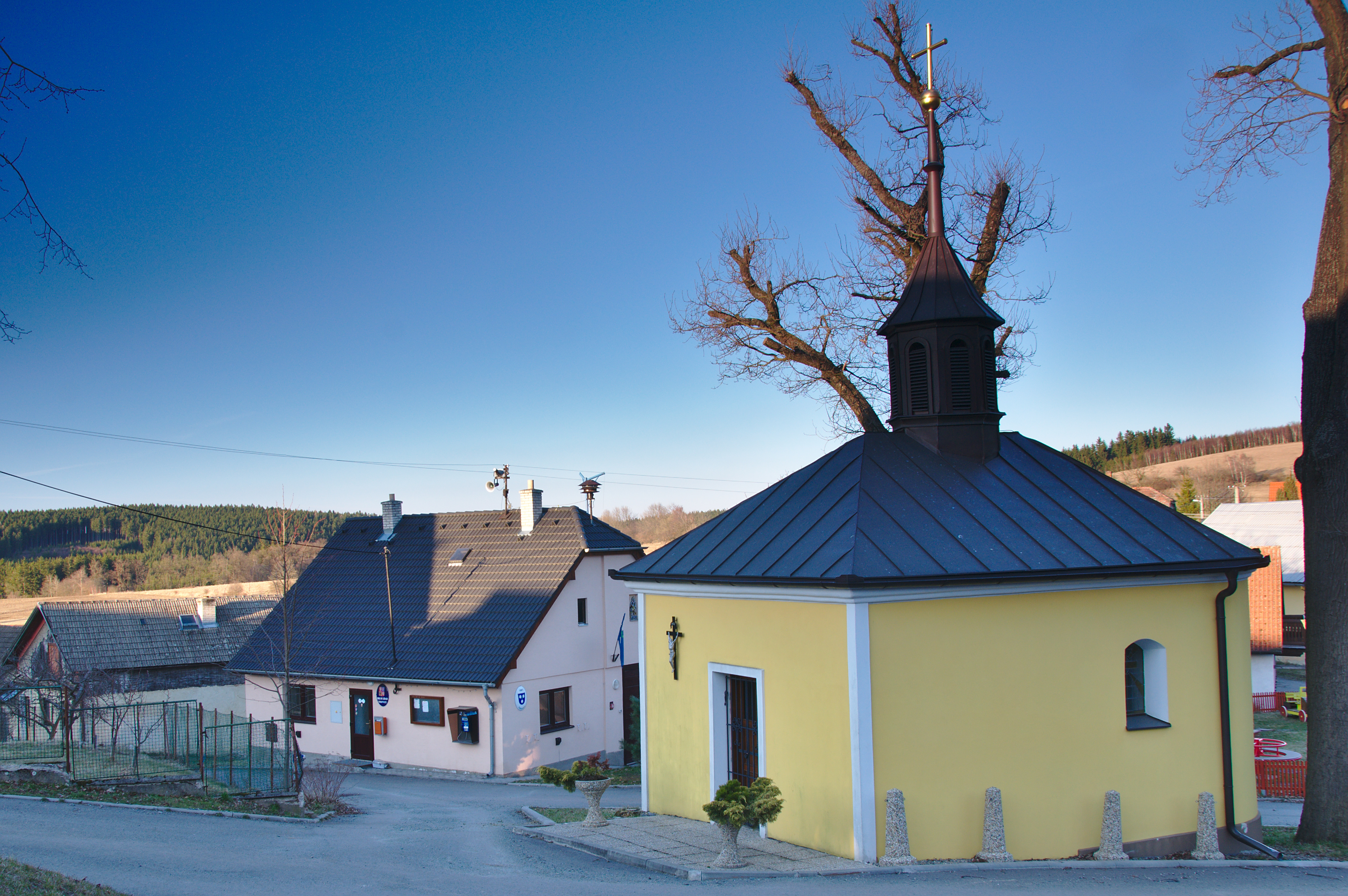 Kaple Nejsvětější Trojice, Tasovice, okres Blansko